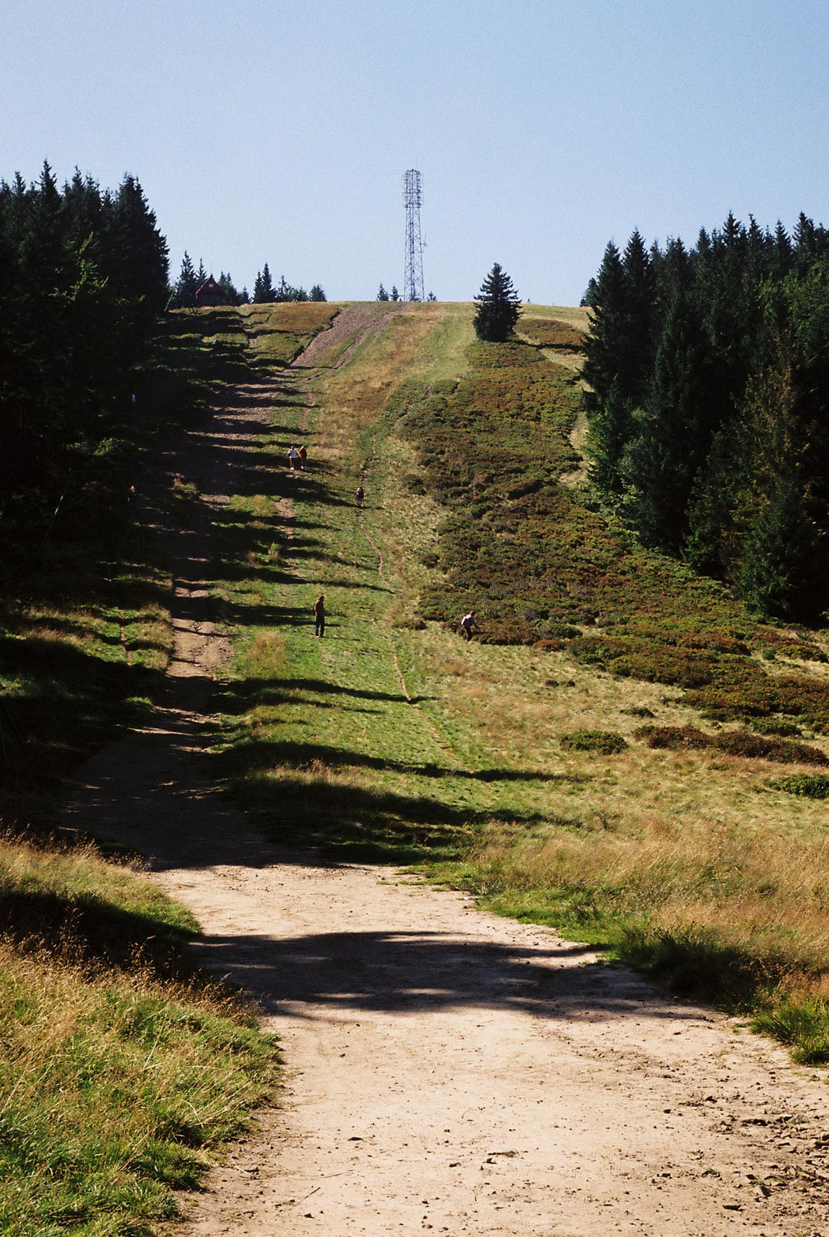 View of Klimczok (Poland, The Beskids) from Kowiorek Pass. Beskidy - Beskid Śląski. Widok na Klimczok z Przełęczy Kowiorek. Author: Pko Date: 2 Sep 2005